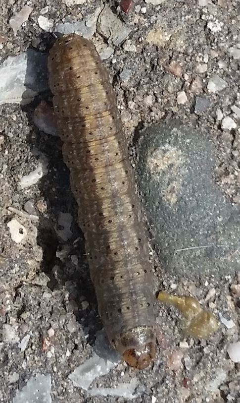 Raupe der Magerwiesen-Bodeneule (Agrotis clavis) am 6.7.2016 in Walldorf/Baden